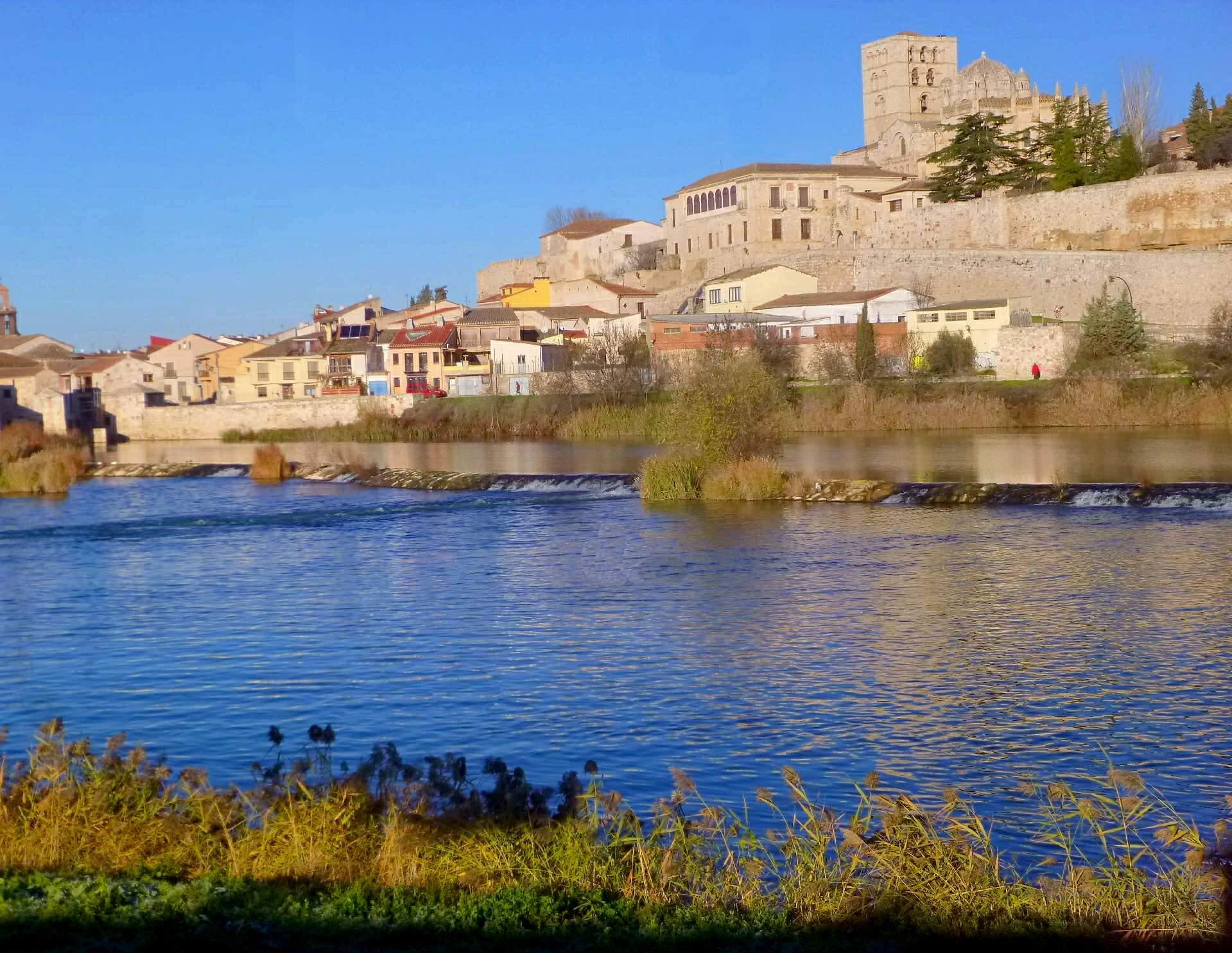 Zamora - Río Duero y Catedral